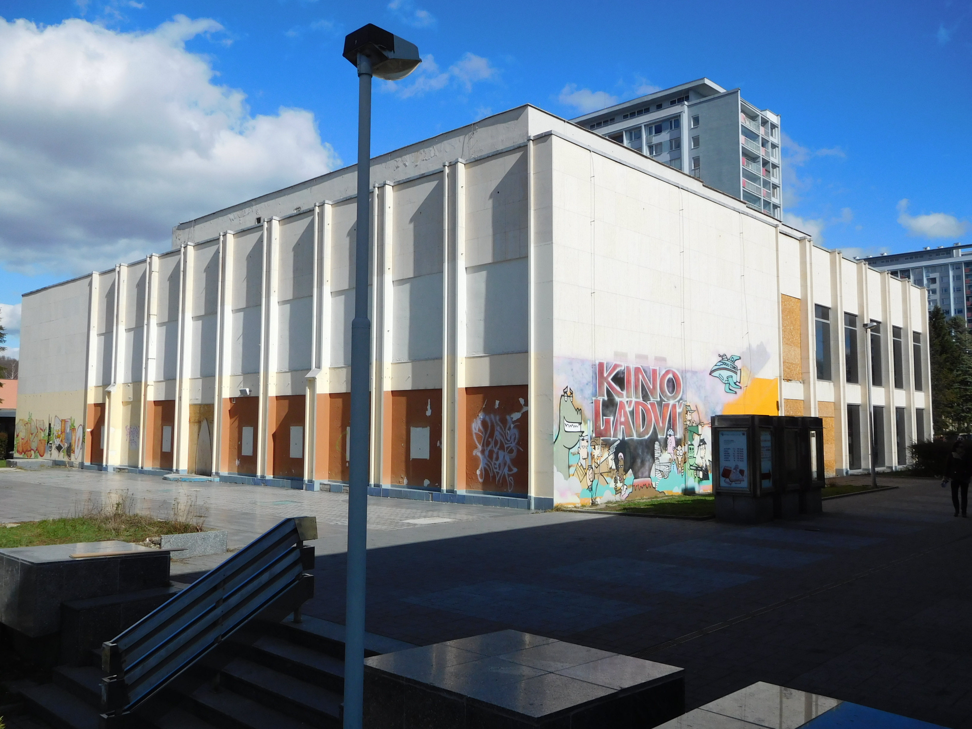 Praha - Kobylisy, Burešova 4, Kino Ládví